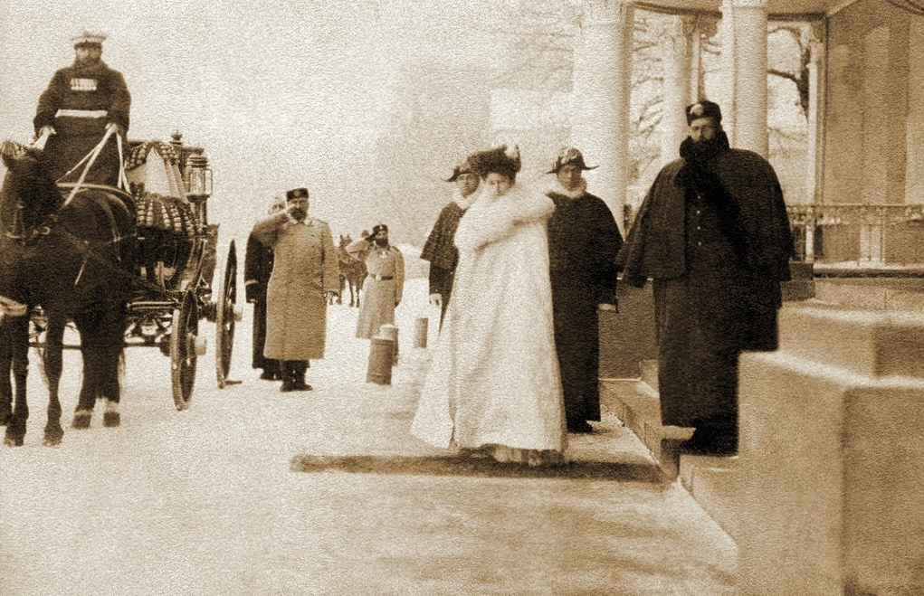 Il granduca Sergej Aleksandrovič con la moglie, granduchessa Elisabetta Fëdorovna davanti al portico di casa. A cassetta, il cocchiere del granduca, Andrej Rudinikin